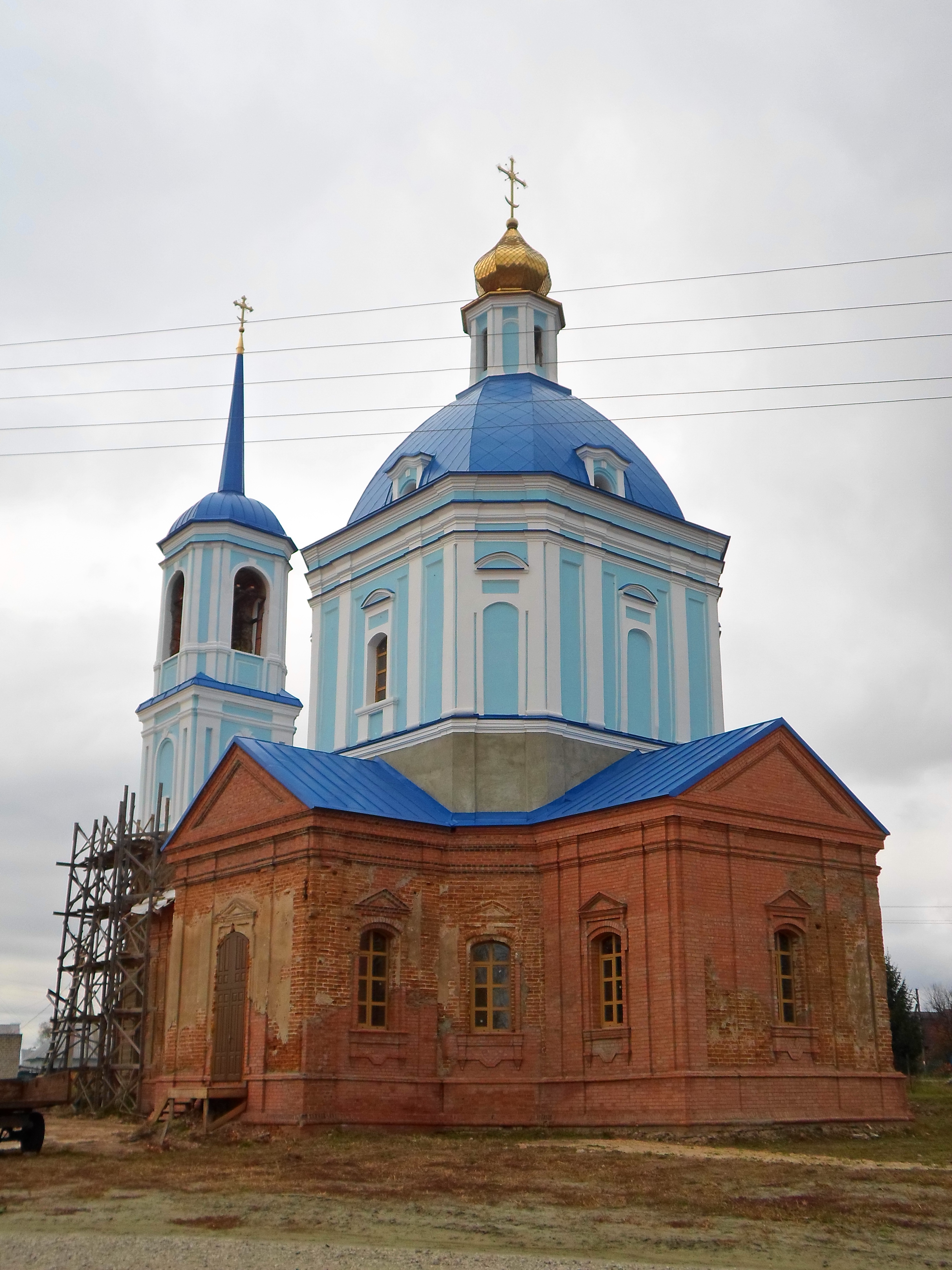 Церковь Рождества Богородицы: Кабаличи, Брянский район, Брянская область